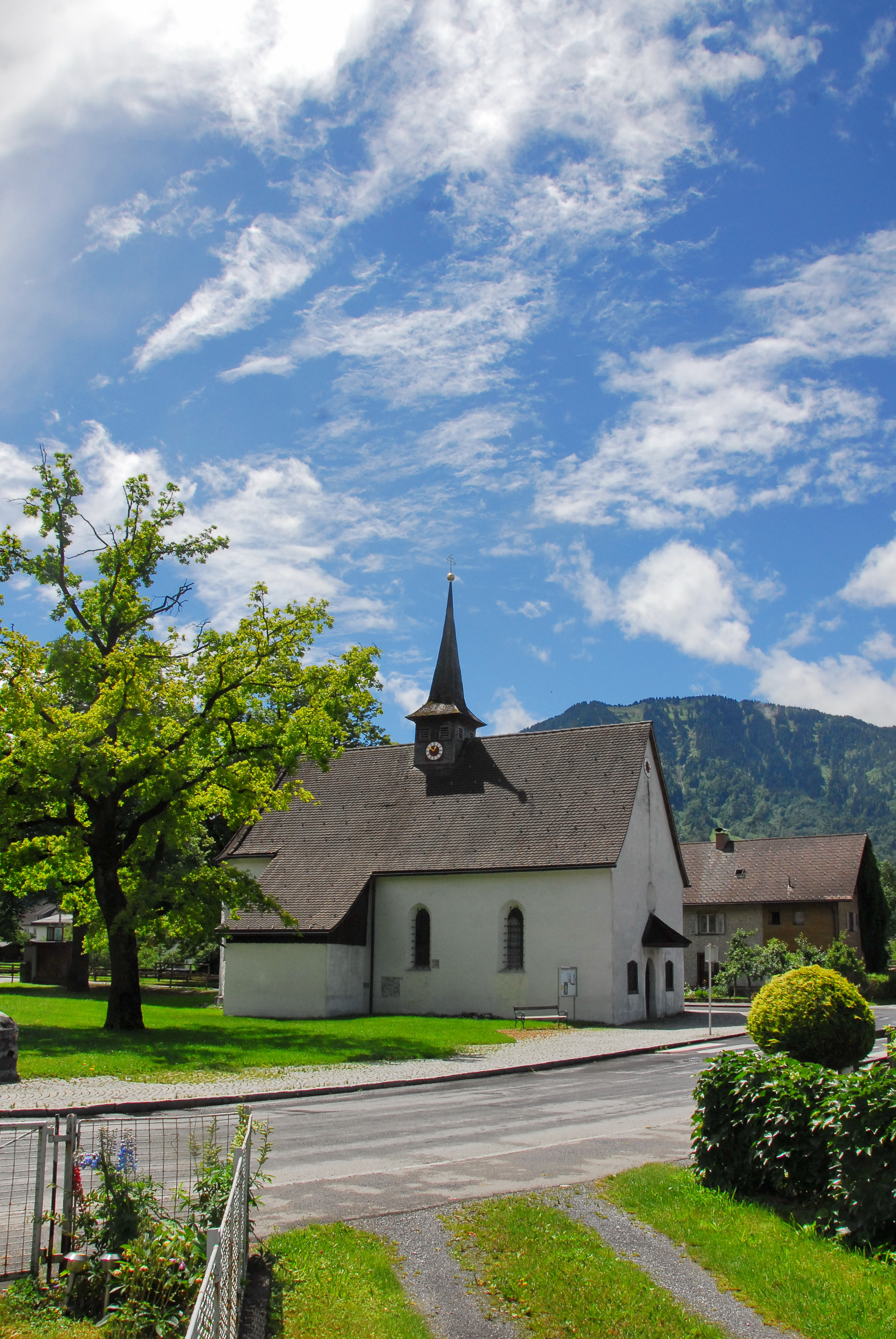 Die St.-Anna-Kapelle wurde 1512 geweiht, sie ist neuesten Bauforschungen zufolge jedoch älteren Ursprungs.